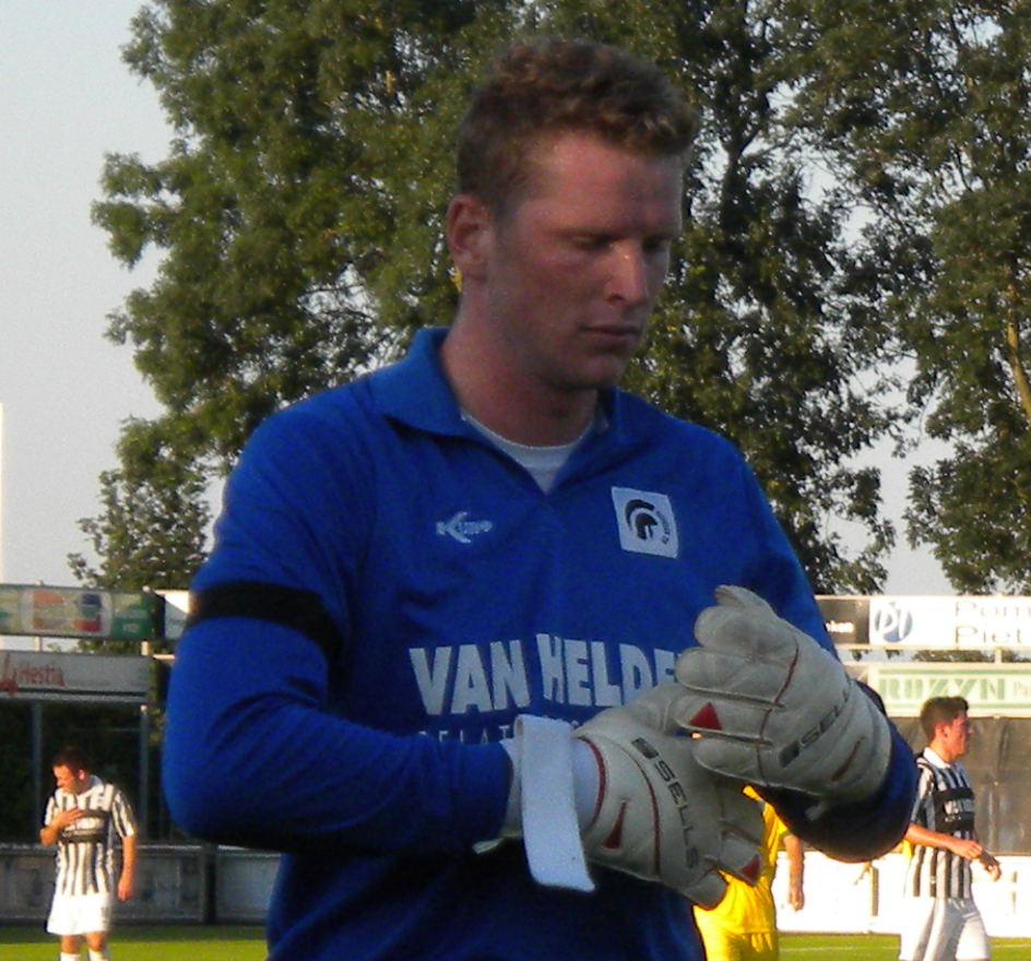 Achilles '29 player Leon ter Wielen walks off the pitch at half time during the friendly with Sporting Lisbon